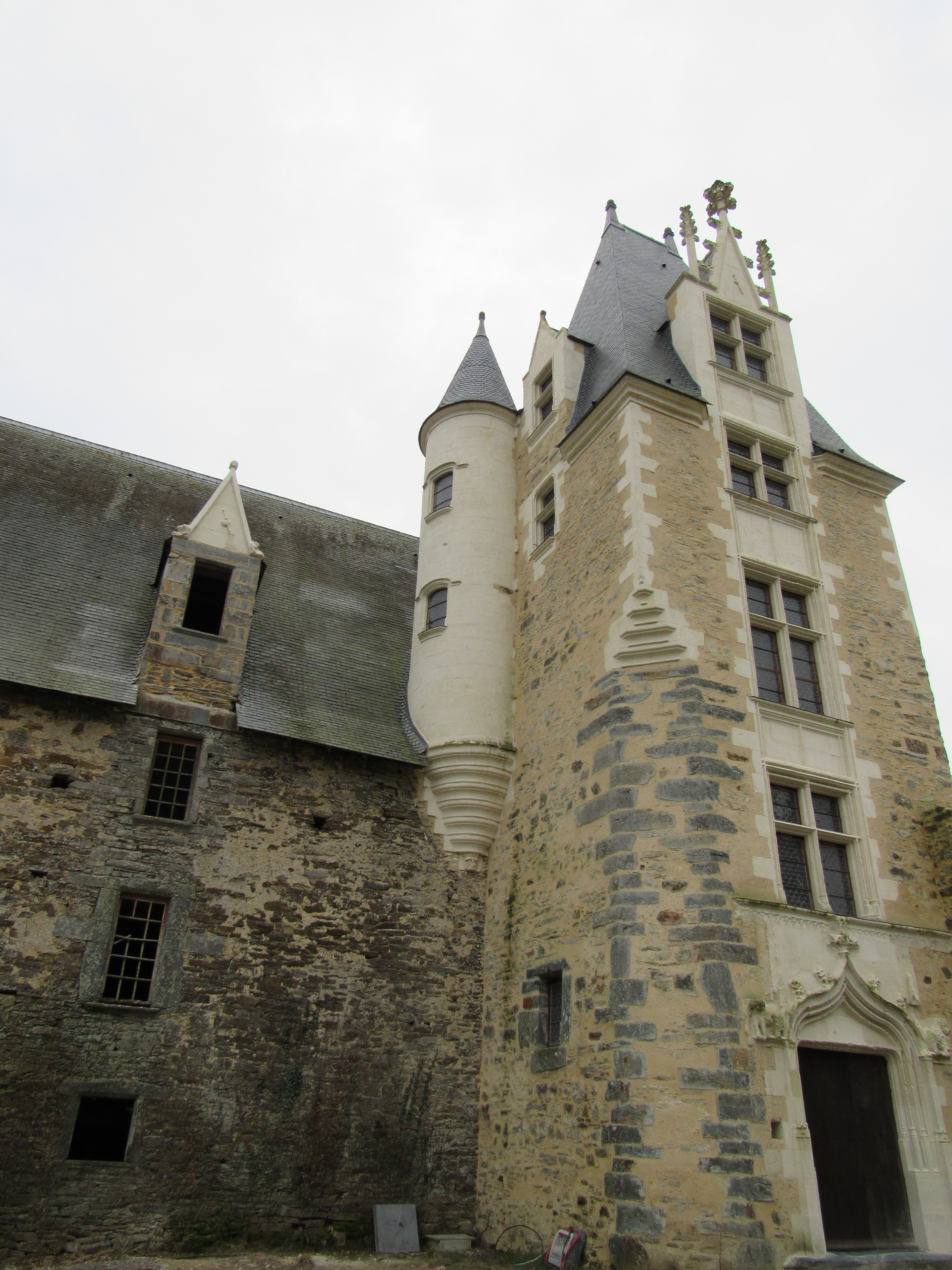 Tour d'escalier sud-ouest du château de la Motte-Glain, après la campagne de restauration de 2017.